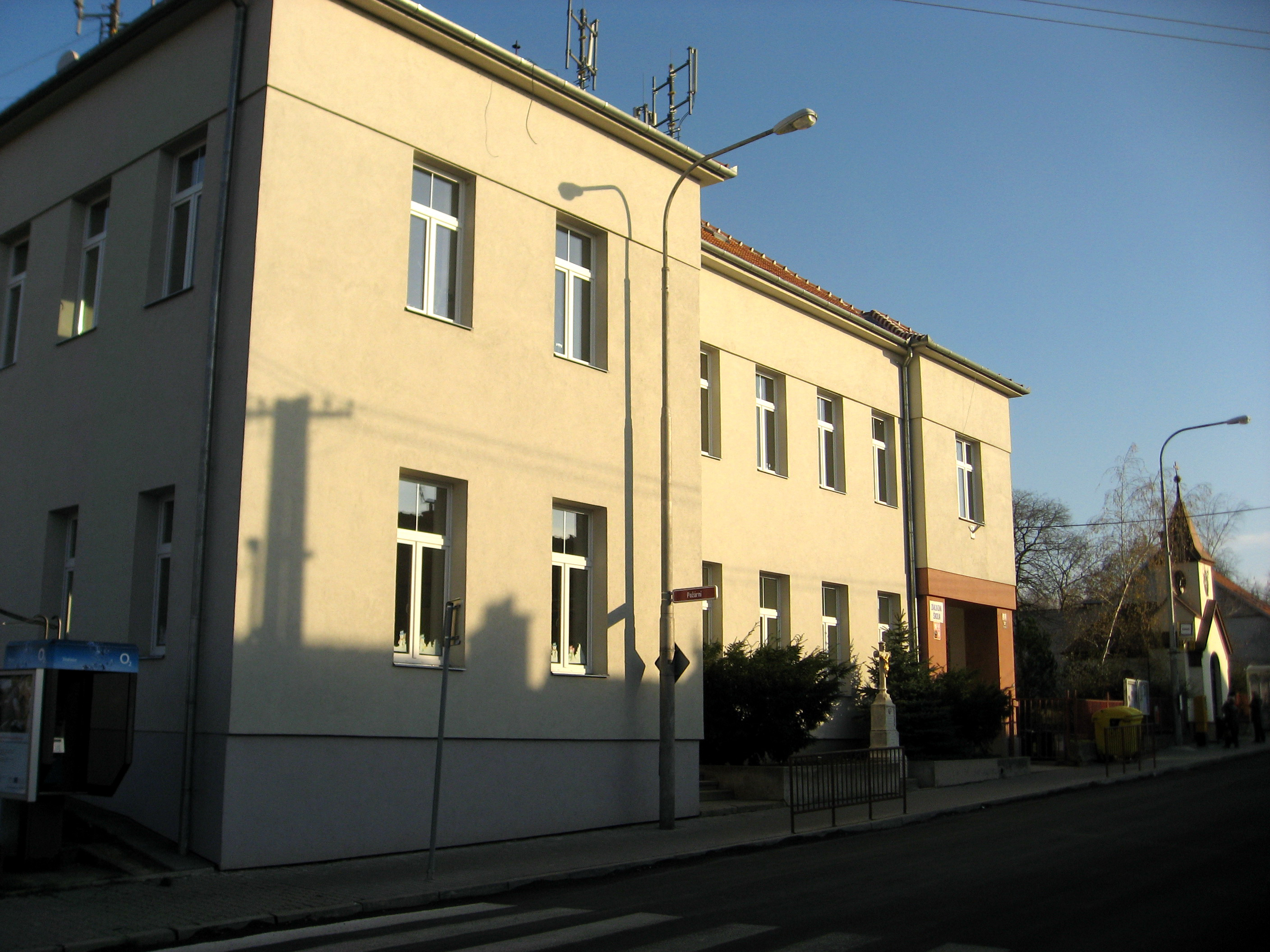 Holásky, škola a kaple